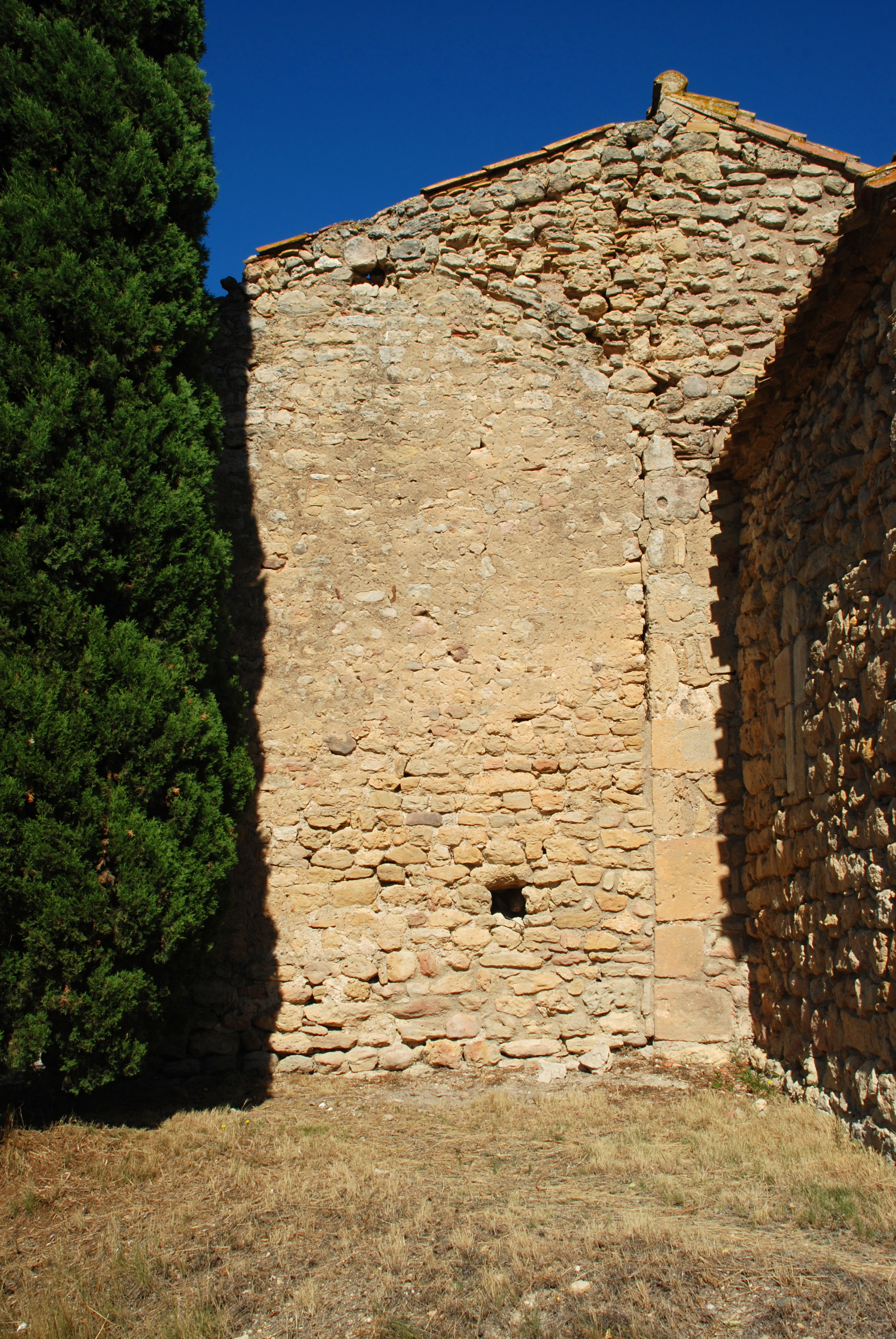 France - Languedoc - Aude - Moussan - chapelle Saint-Laurent (préroman) .